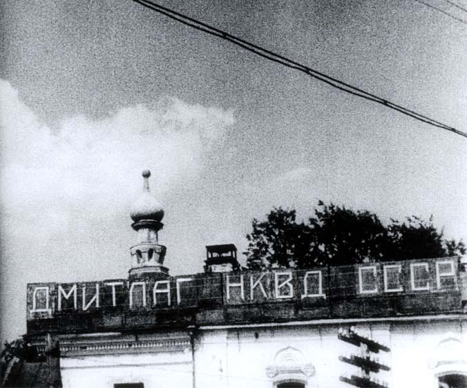 Управление Дмитлага, расположенное в Борисоглебском монастыре с 1932 по 1937 г.